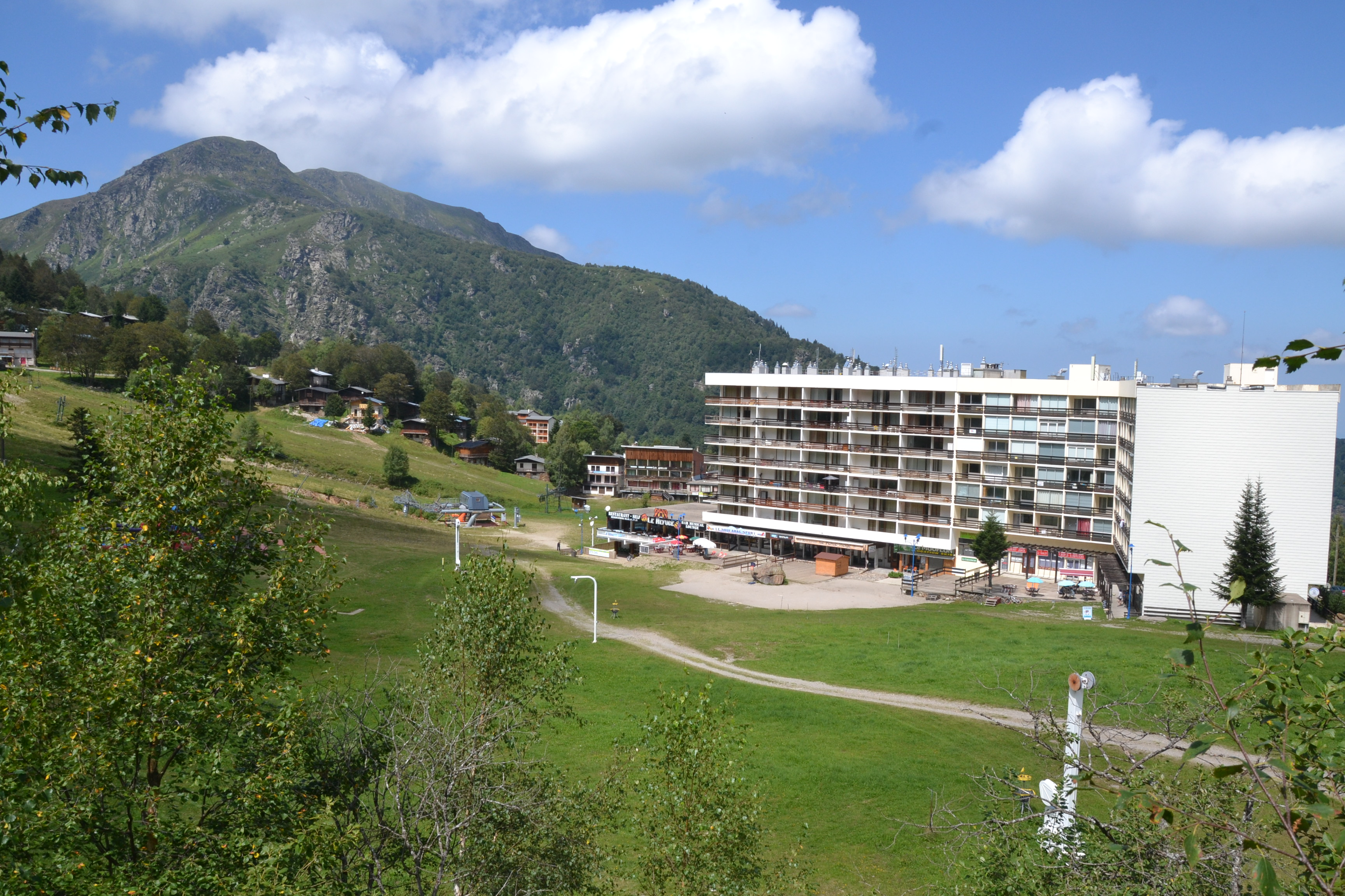 Station des Monts d'Olmes : l'immeuble Le Cristal et le bas des pistes (Montferrier, Ariège, France).